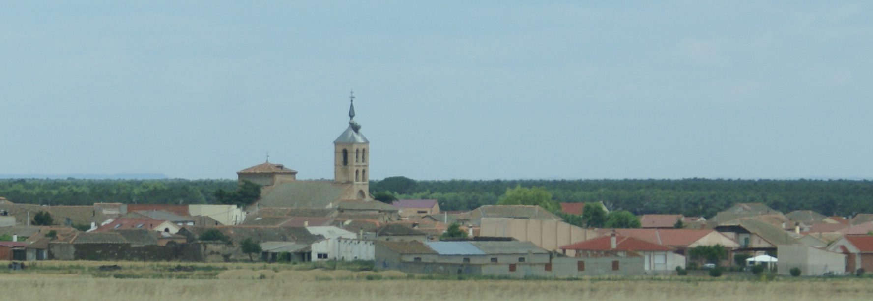 Vista de Nieva, Segovia